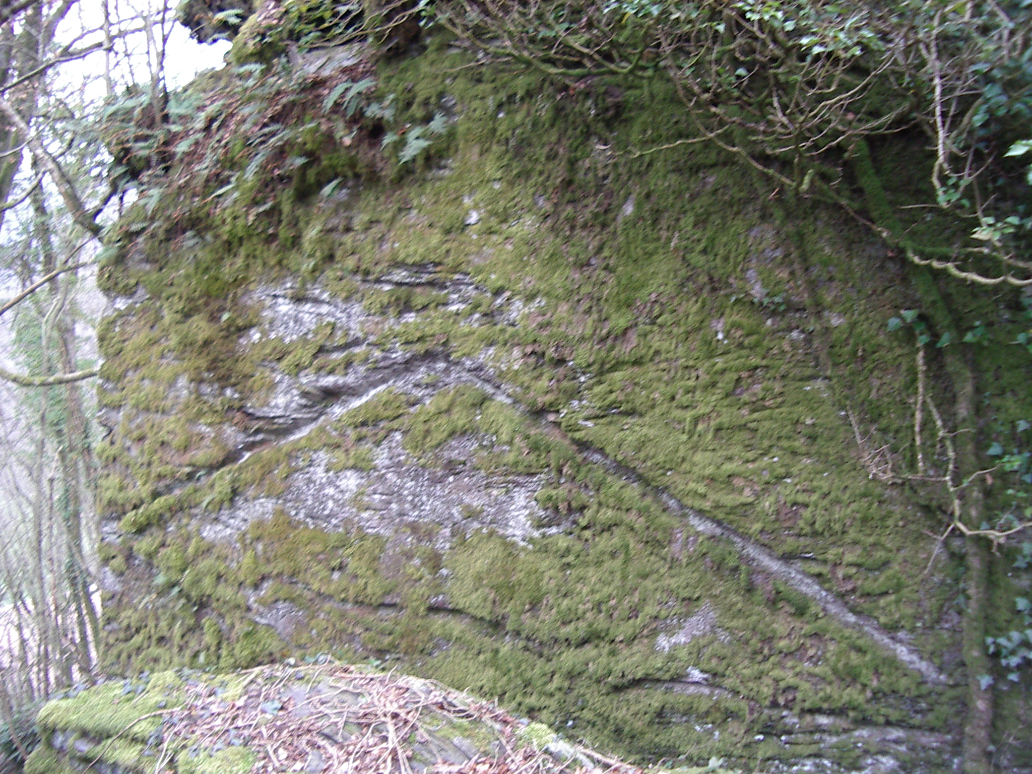 Château de Linchamps :Coin Nord Est du donjon, faîtage de batiment